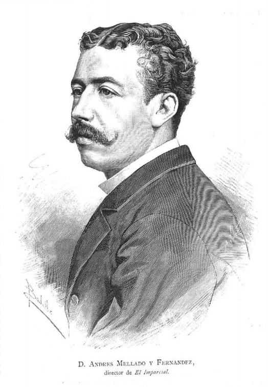 Retrato de Andrés Mellado y Fernández, recogido en la revista española La Ilustración Española y Americana.